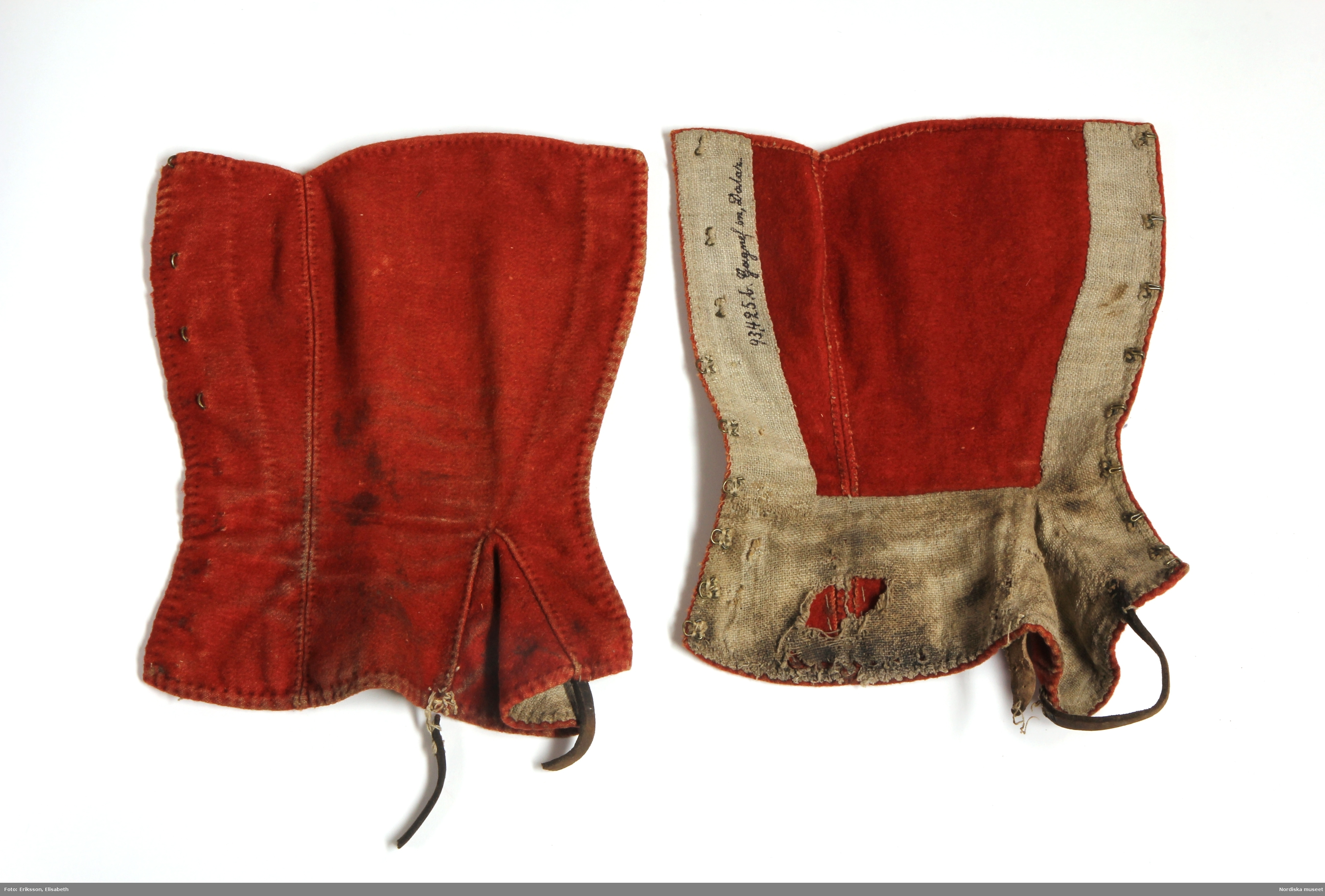 Damasker